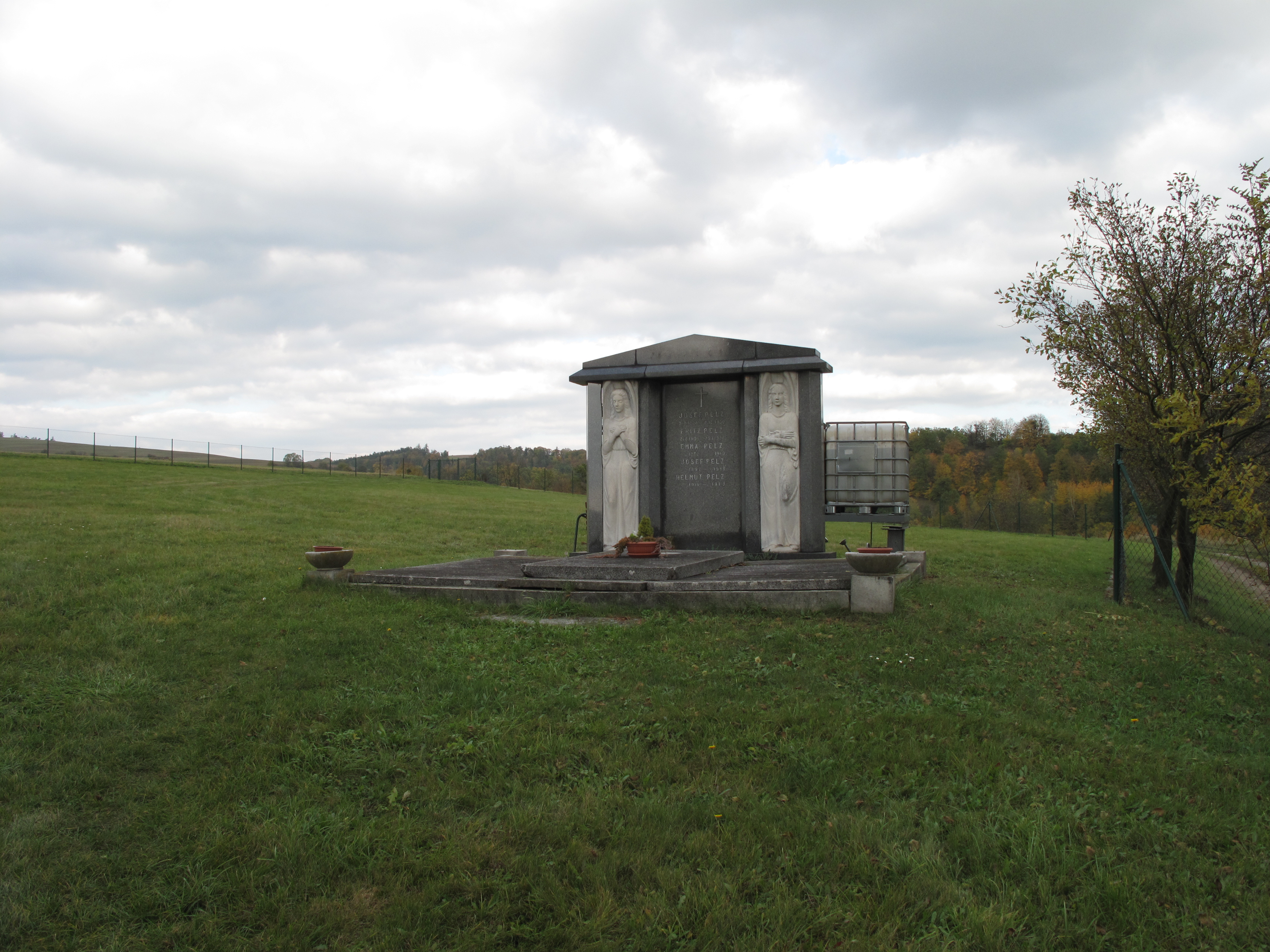 Lukavec (Fulnek). Okres Nový Jičín, Česká republika.